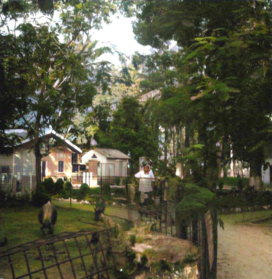 Zoo de Kinshasa. Noviembre de 1972.